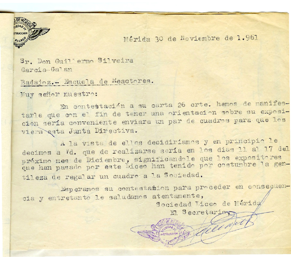 Carta del secretario de la Sociedad de Instrucción y Recreo Liceo de Mérida a Guillermo Silveira García-Galán con fecha 30 nov. 1961.